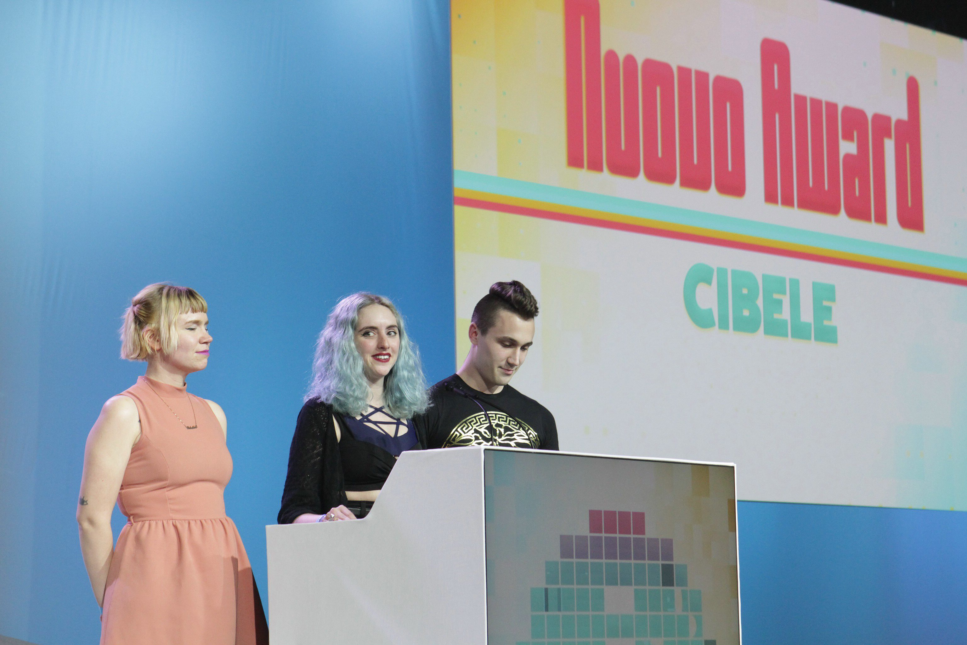 16-19_14_16-01-7D2_1170